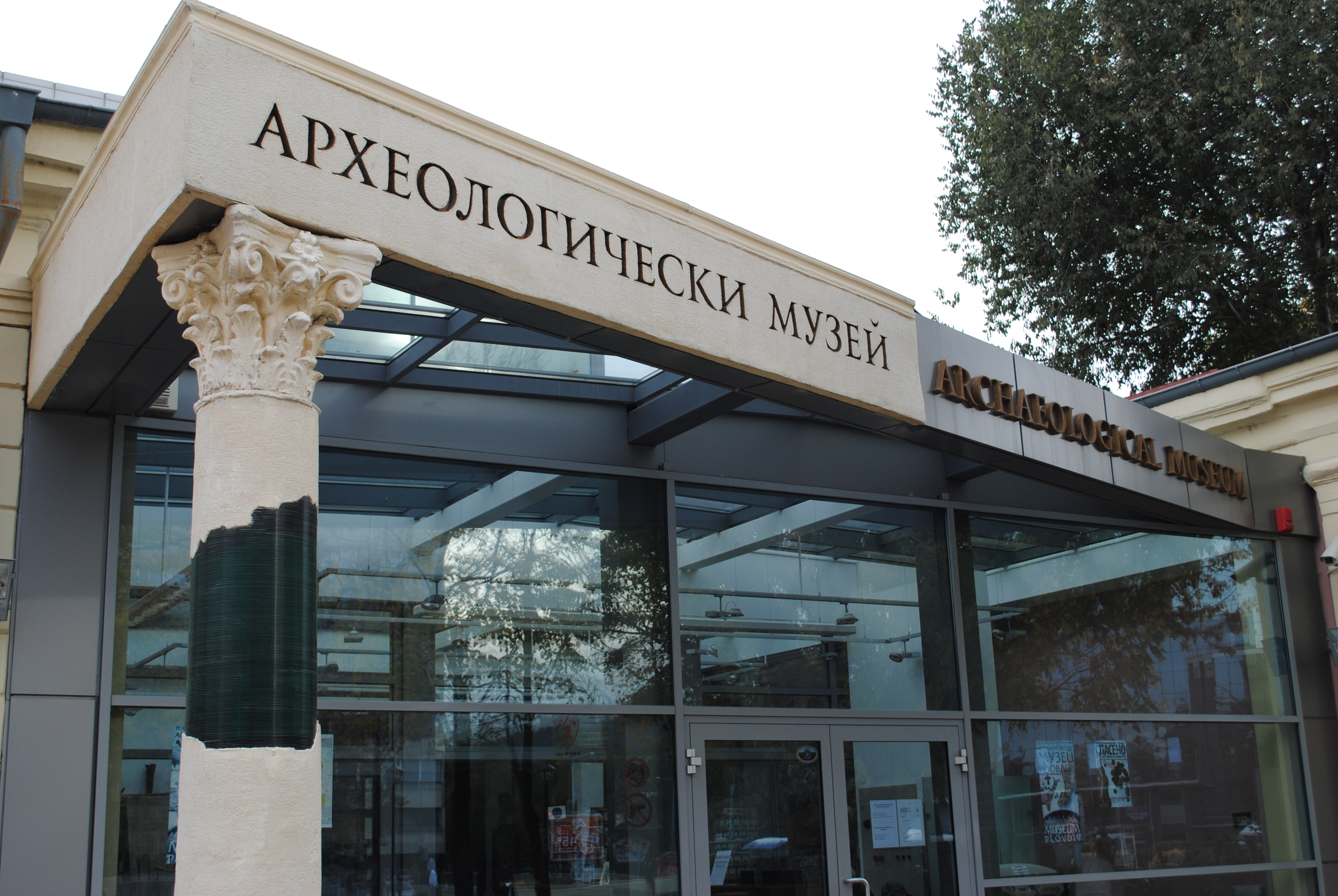 Входът на Регионален исторически музей Пловдив, България